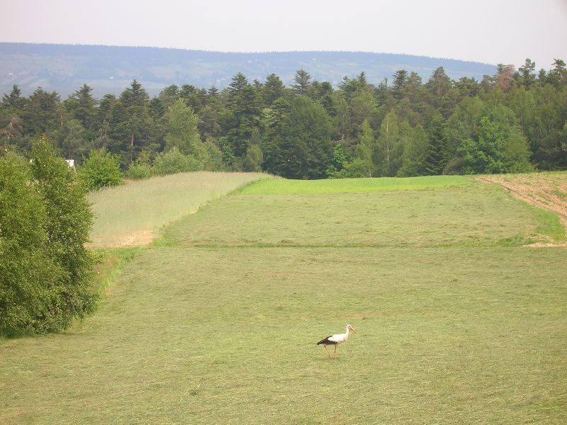 Krajno - Góry Świętokrzyskie .